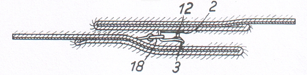 Patent für einen Pelzbekleidungs-Verschluss, den „Keska“ der Firma Keskari. Patent Nr. 308680 des Österreichischen Patentamts vom 10. Juli 1973. Ausschnitt der Patentschrift.